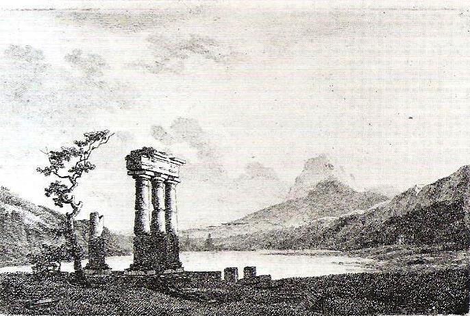 Landschaft mit Tempelruine, um 1803, Radierung, 9,5 x 14,9 cm